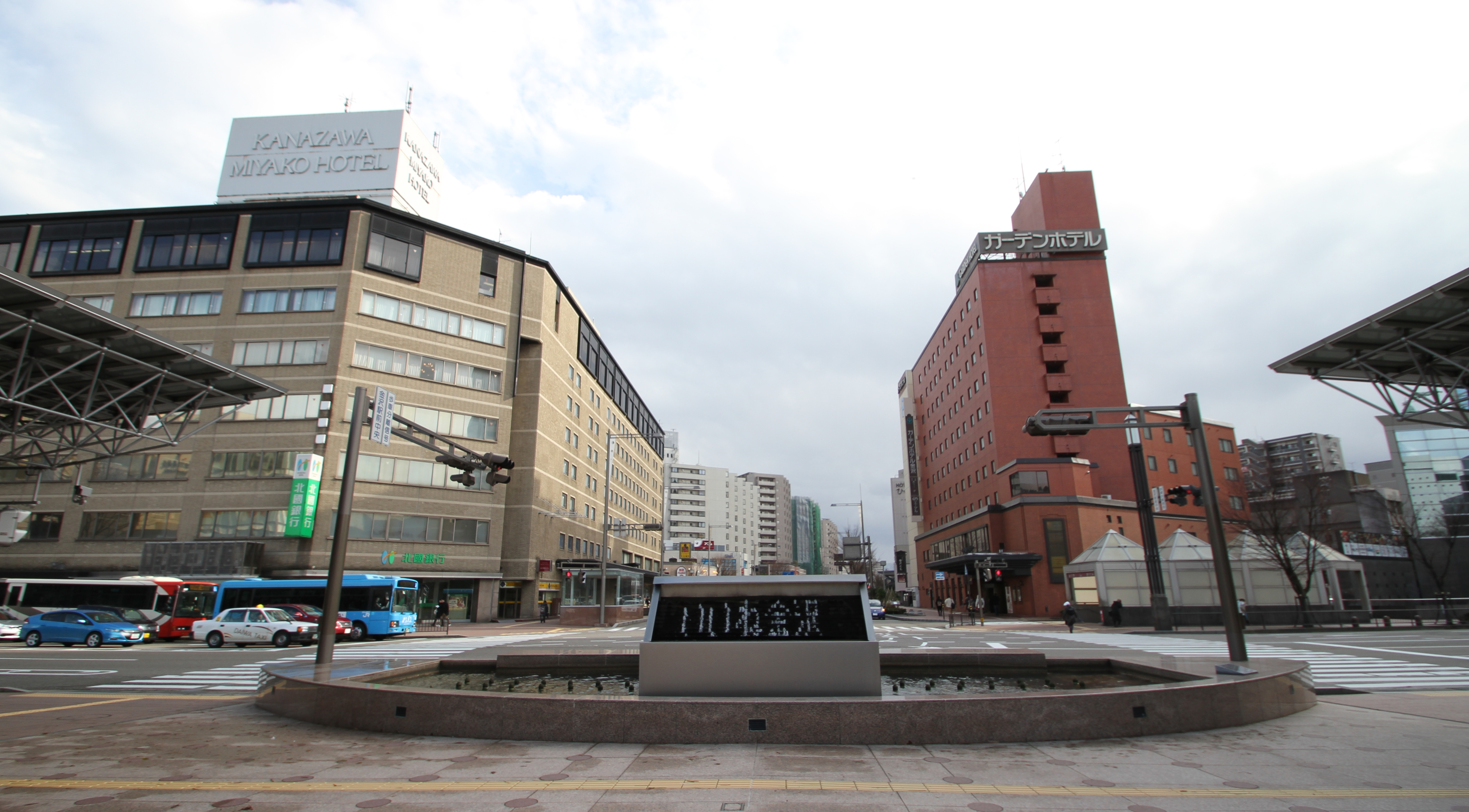 Kanazawa Station